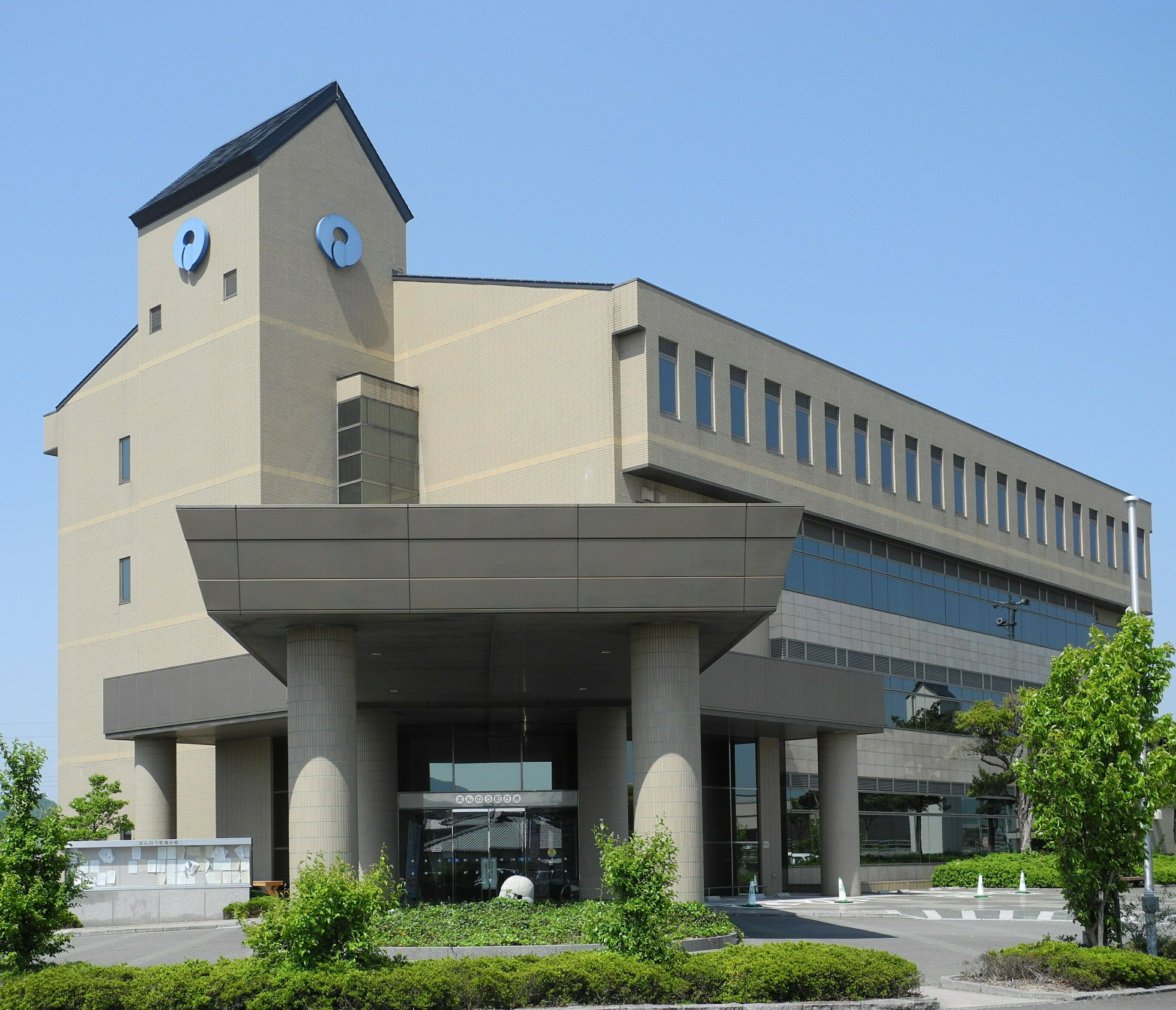 まんのう町の町役場 - 日本国香川県仲多度郡まんのう町。